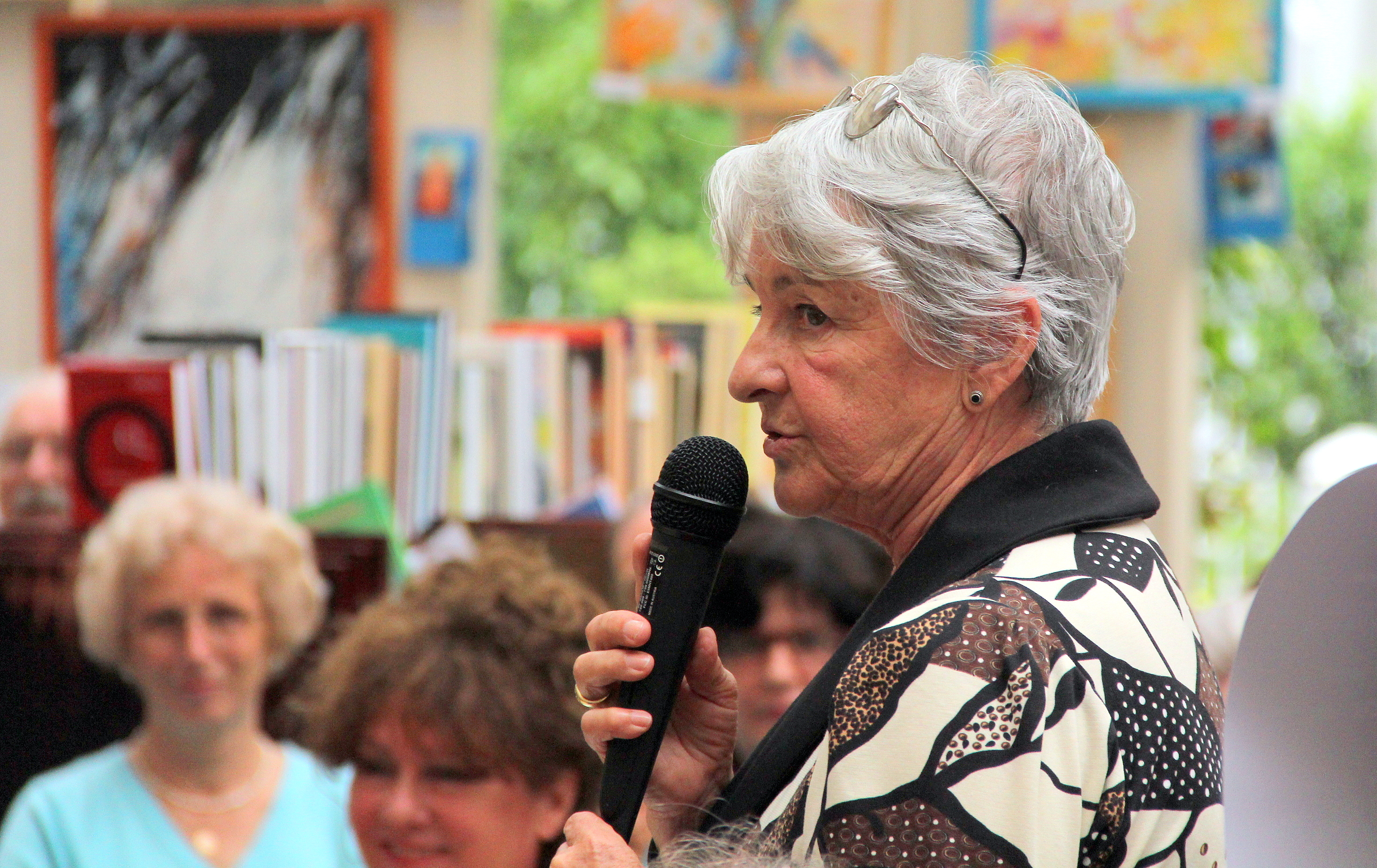 Gróf Nádadsdy Borbála - könyvbemutatója a Litea könyvesboltban, 2012.